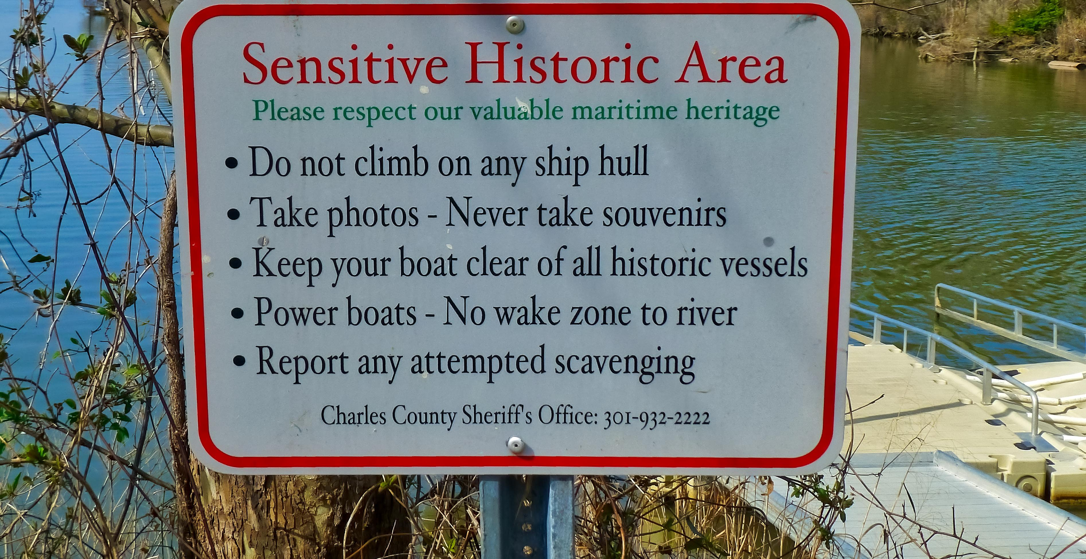 Take photos - Never take souvenirs